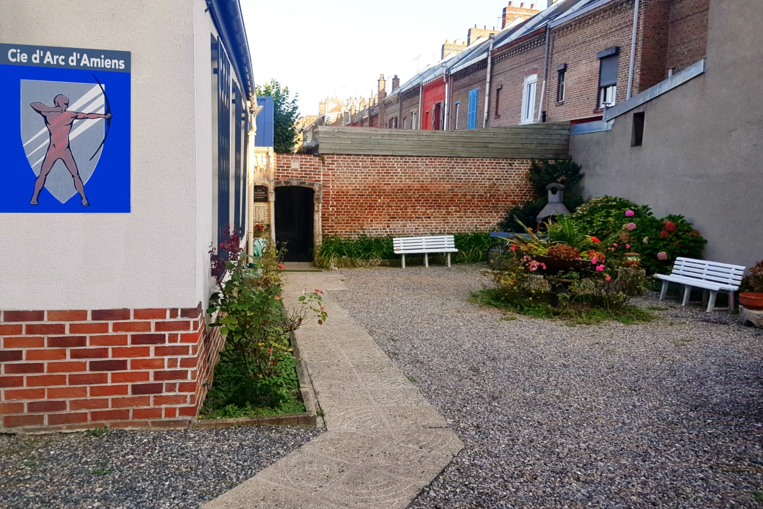 Jeu d'Arc de la Compagnie d'Arc d'Amiens, vue extérieure